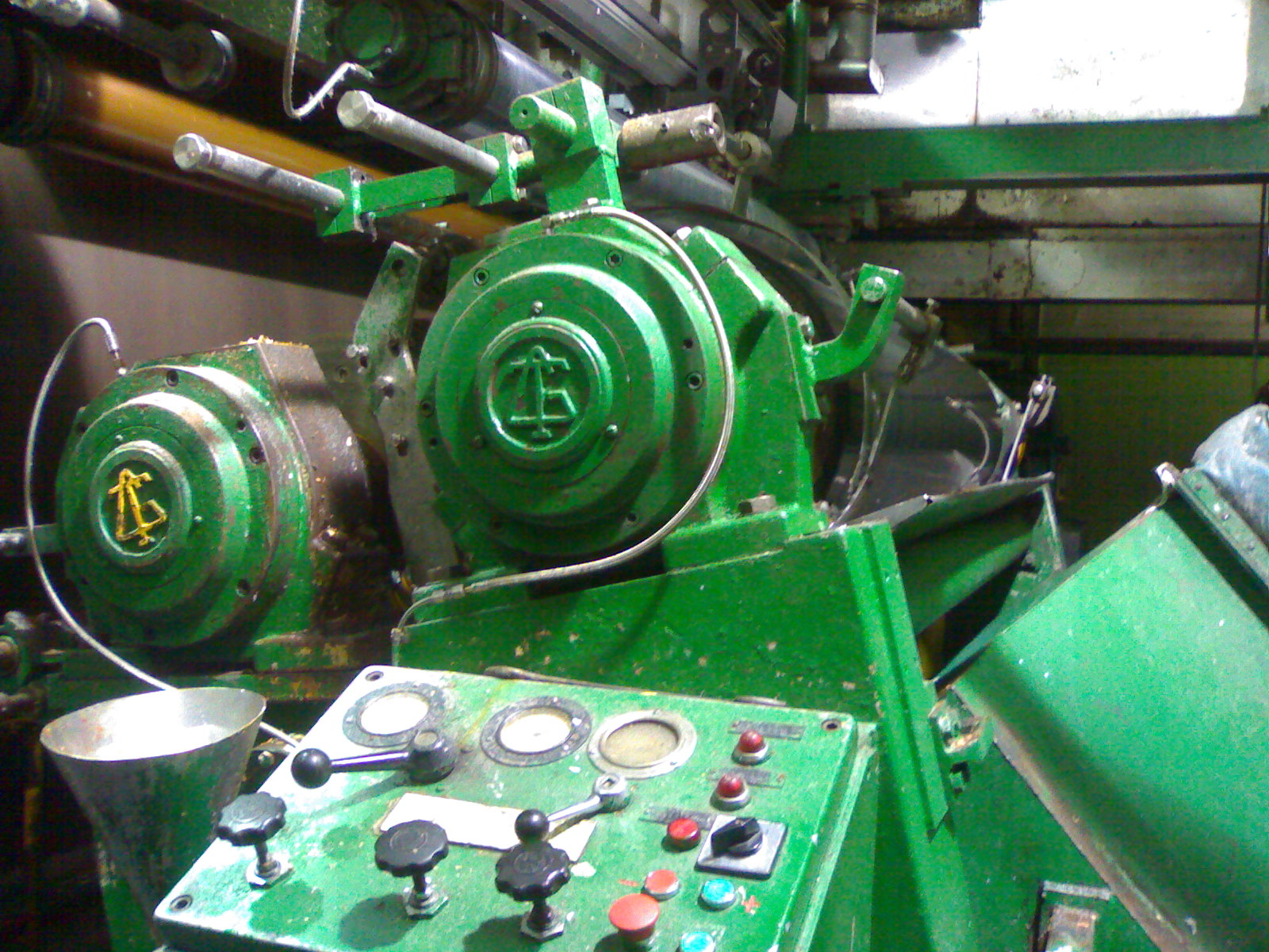 Zona de tratamiento superficial del papel